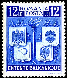 Entente balkanique